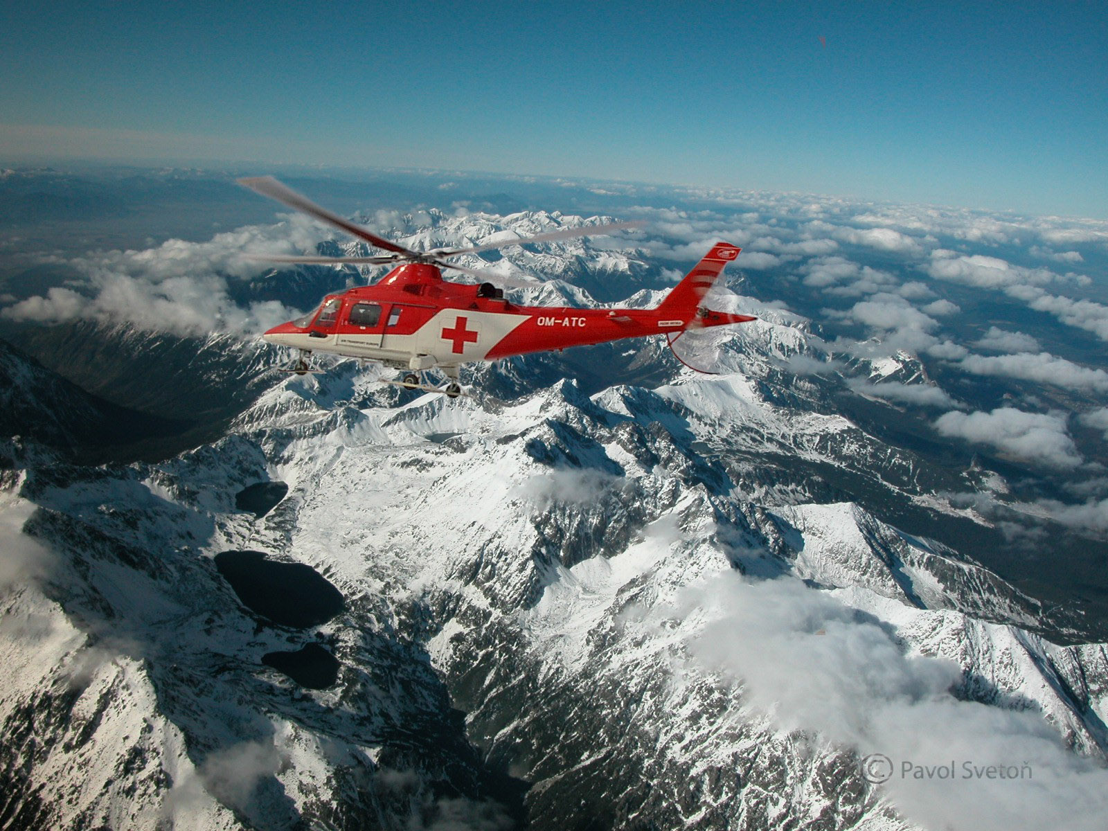 Vrtuľník Agusta A109K2 nad Vysokými Tatrami